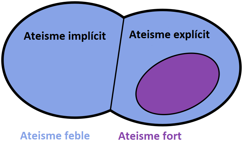 Gràfic de l'ateisme explícit i implícit